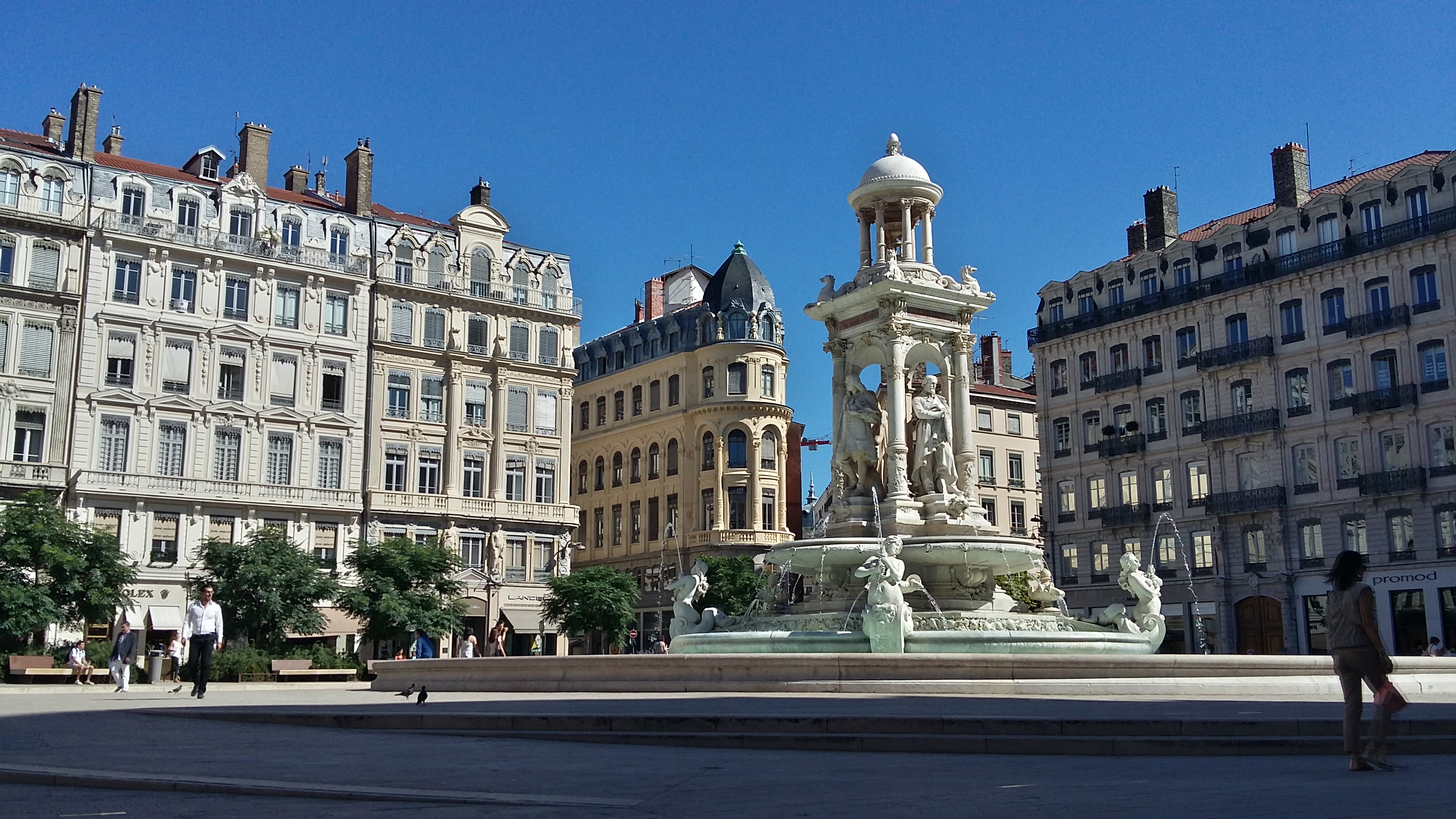 Place des Jacobins à Lyon